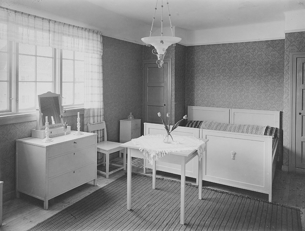 Beskrivelse: Soveværelse. Østkantutstillingen sommeren 1931. Fotograf: Nanna Broch (?) Sted: Oslo Tid: 1931 Arkivreferanse: RIKSARKIVET - PA680_11_1